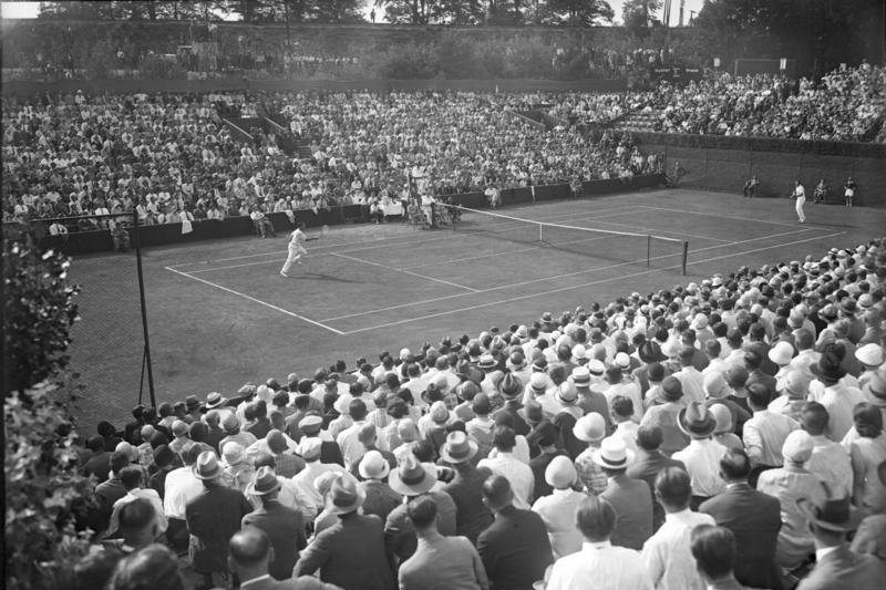 Zehntausende von Zuschauern beim Tenniskampf um den Davis-Pokal auf den rot-weiss-Plätzen in Berlin-Grunewald ! Blick auf die ungeheure Menschenmenge während des Kampfes des deutschen Meisters Prenn (links) und des amerikanischen Tennismeisters Hunter (rechts).